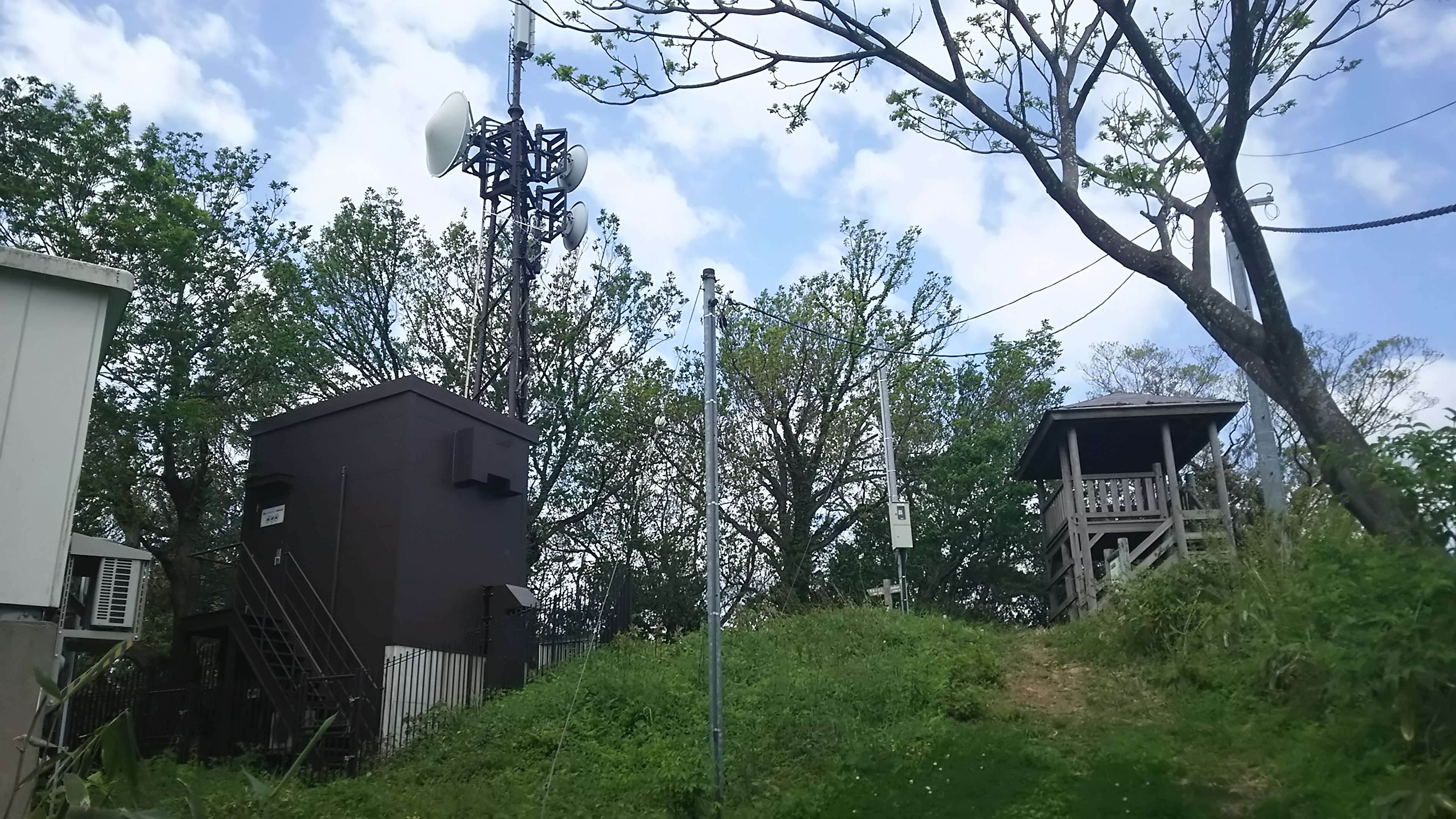 二上山丘陵の北側に位置する大師ヶ岳の山頂。